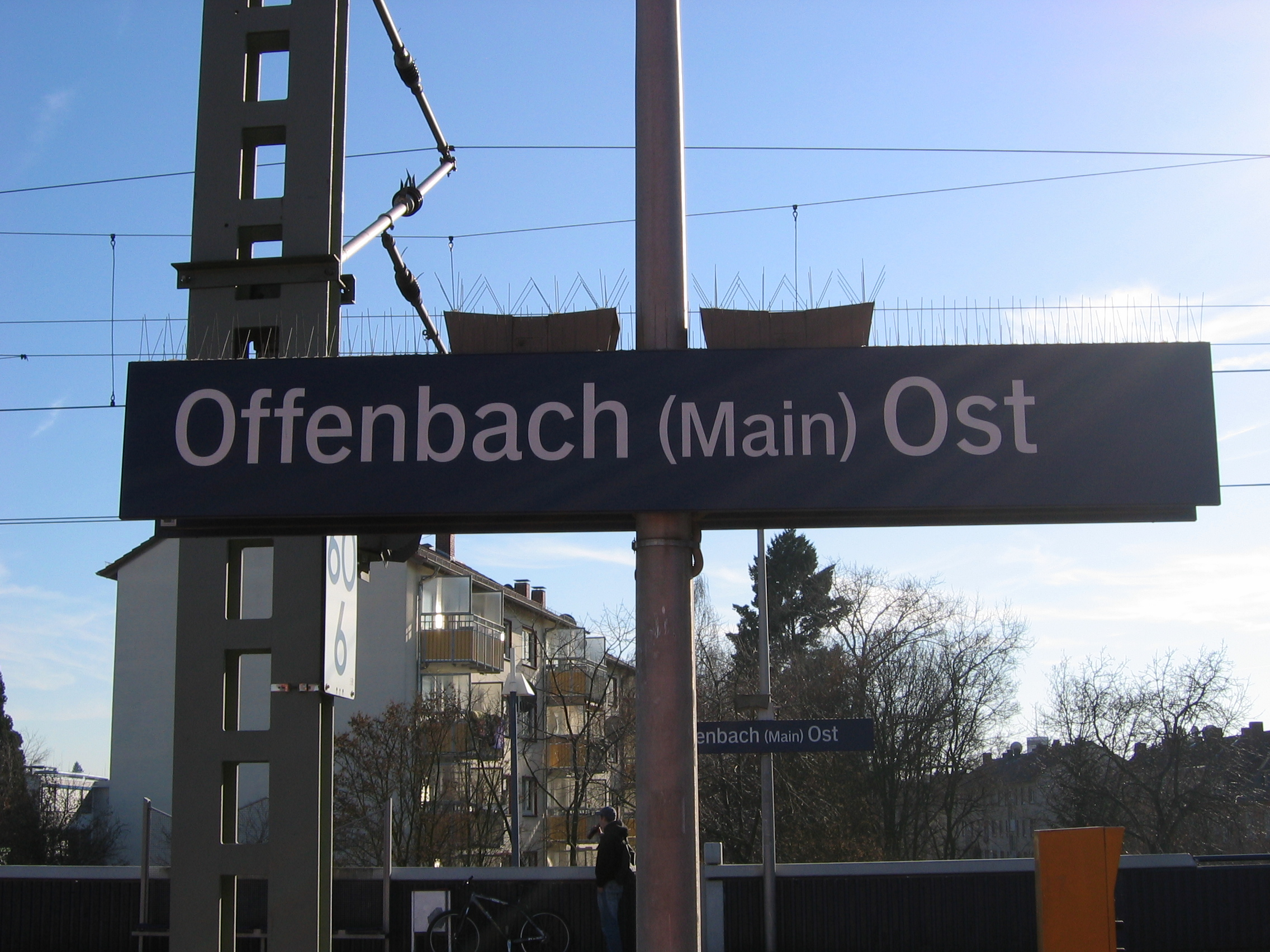 Sign of the station Offenbach am Main-Ost / Bahnhof Offenbach am Main-Ost